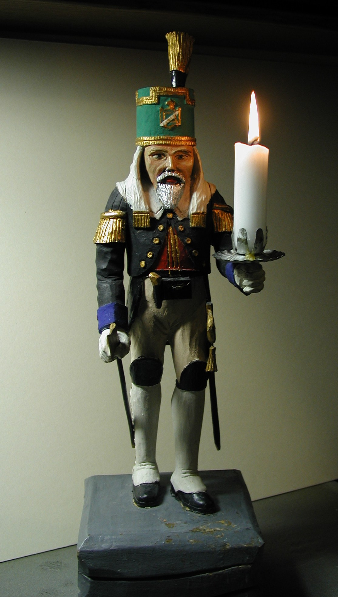 Bergmannsleuchter; Volkskunst von 1950